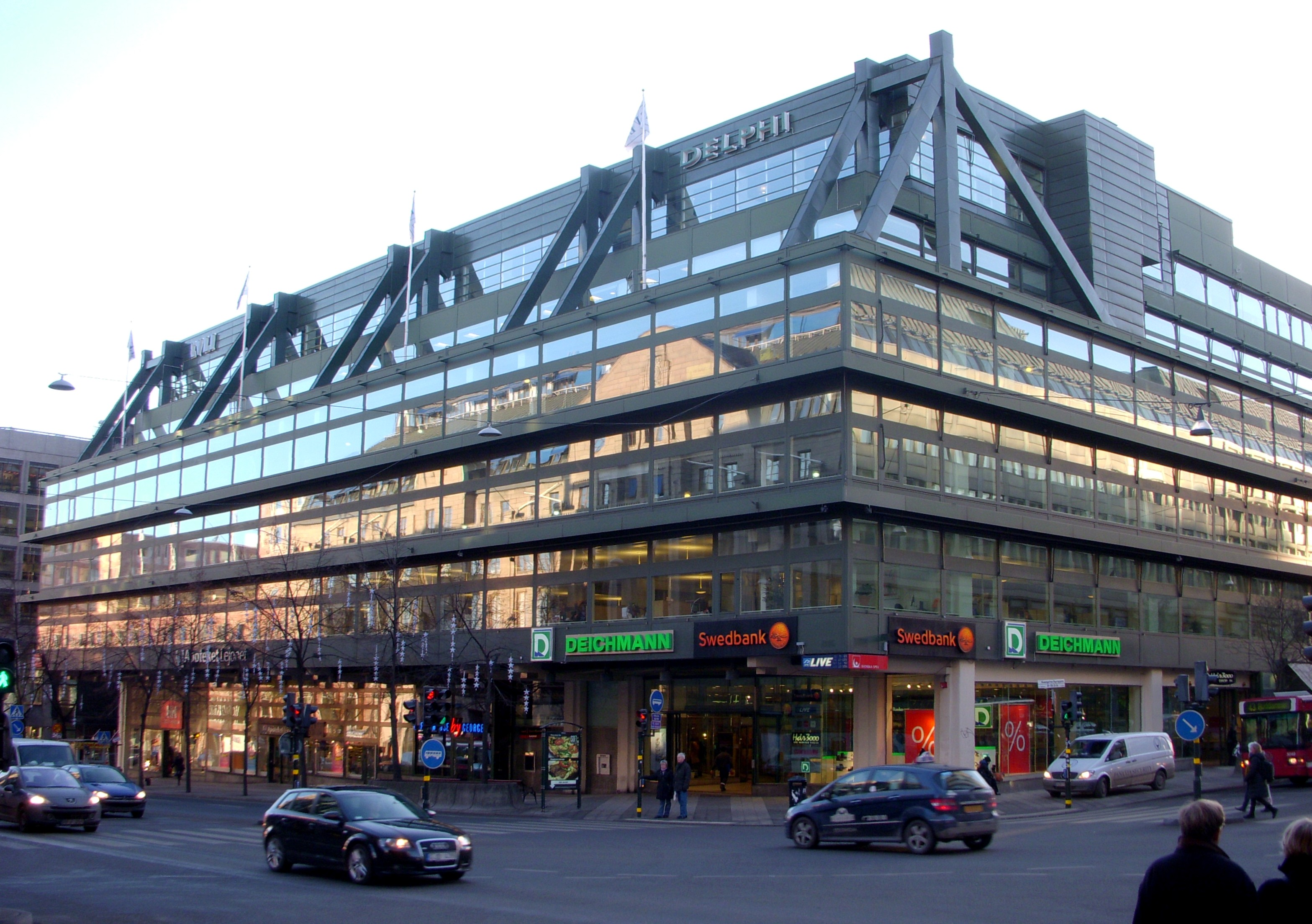 Sparbanks-huset vid Hamngatan i Stockholm